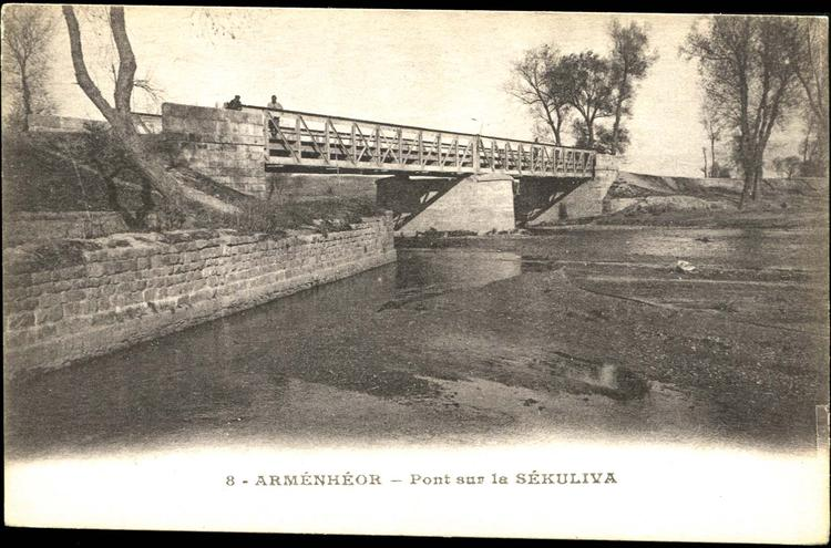 Сакуева при Арменово.